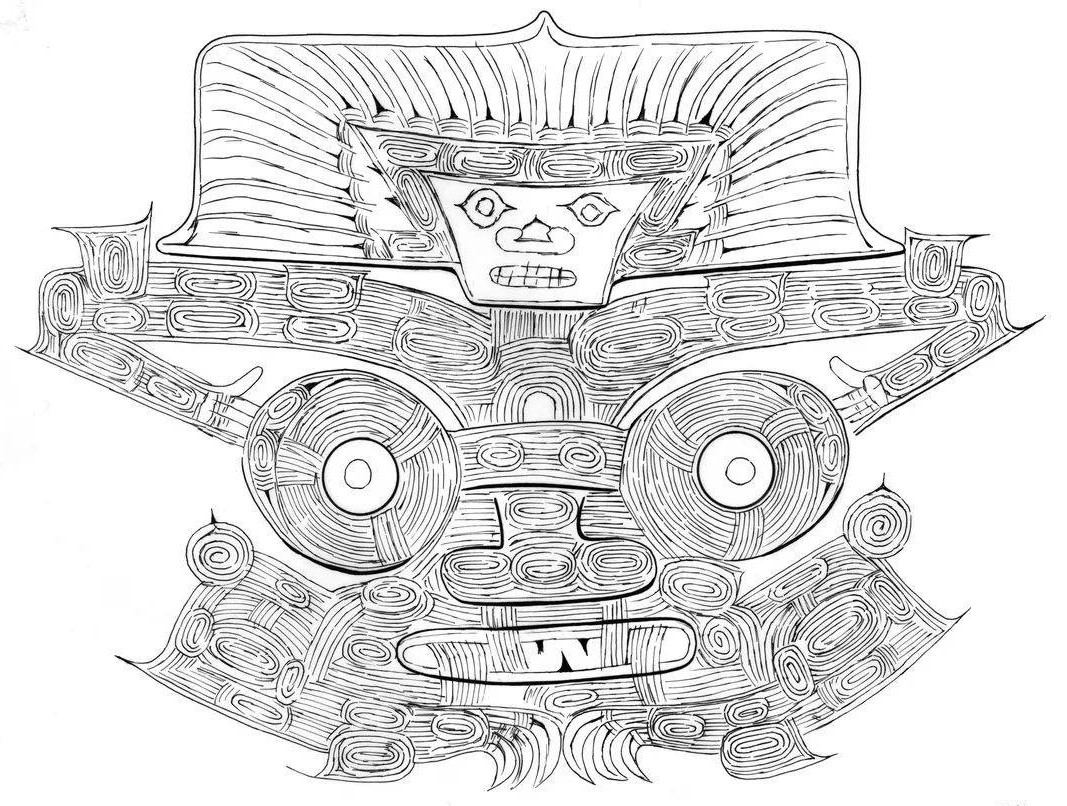 良渚玉琮上的獸面紋